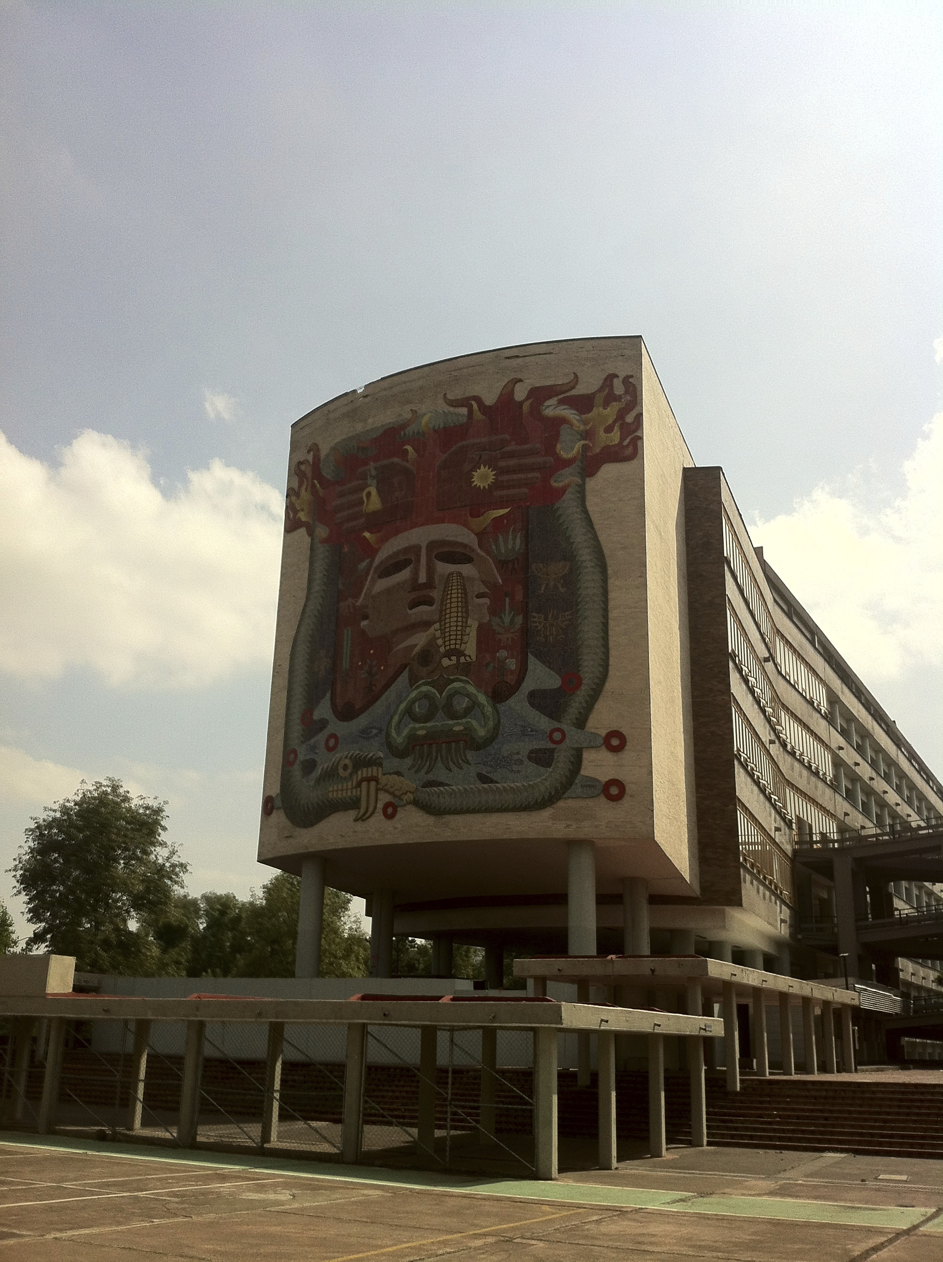 Representando la concepción cosmológica y teogónica humana de nuestros ancestros indígenas, simbolizada en la vida y la muerte, los cuatro elementos (agua, aire, fuego y tierra), así como el mestizaje, Francisco Eppens, realizó en cerámica vidriada el mural de la Facultad de Medicina. De una forma simbólica; sintética y decorativa muy amplia y visible a gran distancia. Fuente